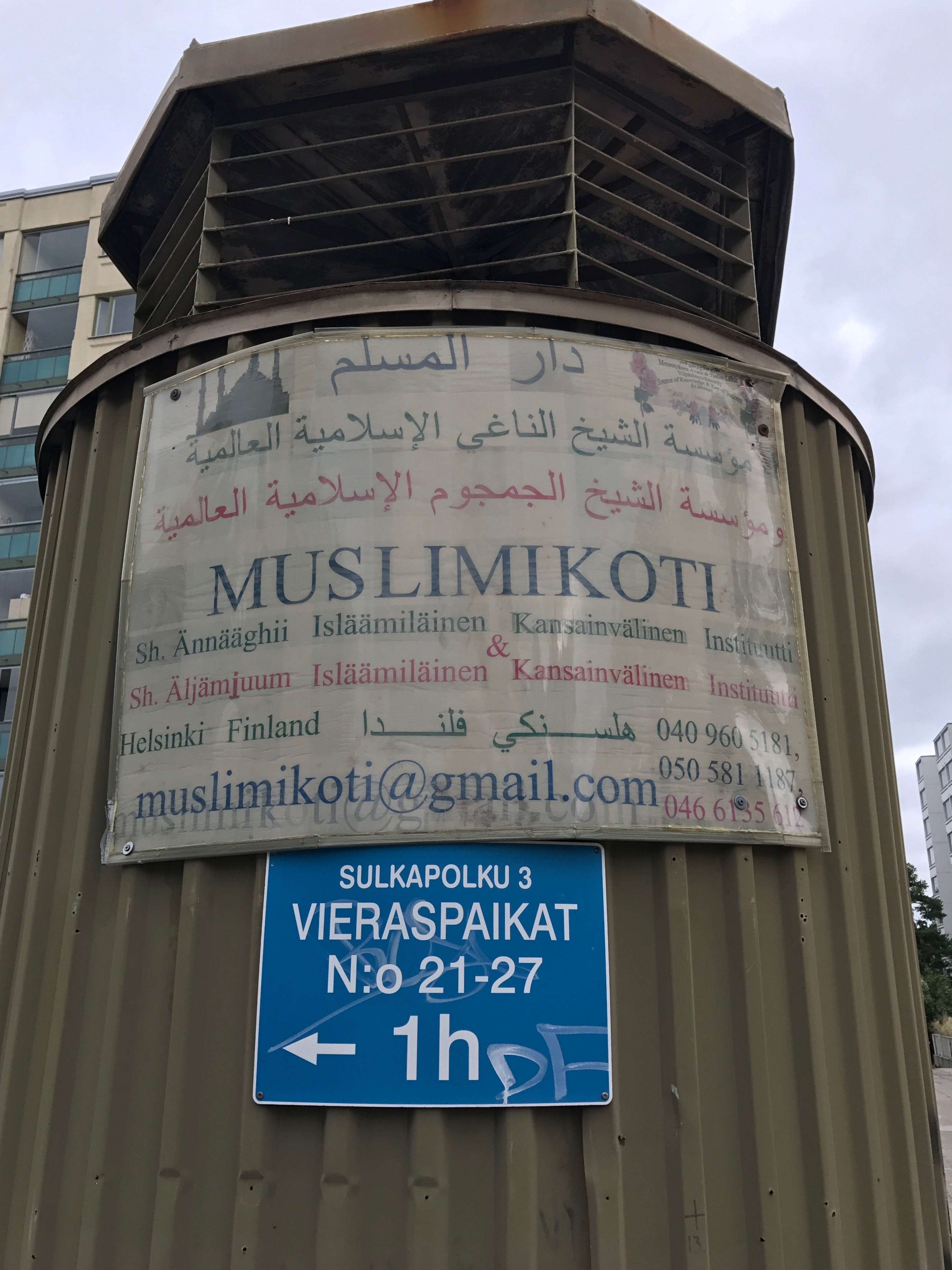 Yhdyskunta Muslimikodin infotaulu Helsingin Pitäjänmäellä, Sulkapolku 3.